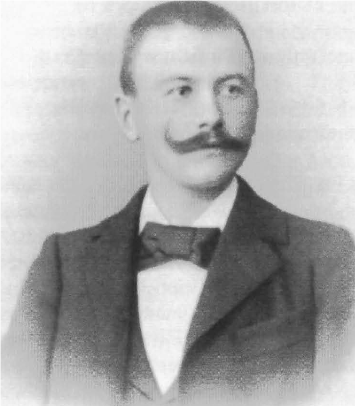 Portraitaufnahme von Karl Ludwig Sütterlin (1865-1917), Gebrauchgrafiker